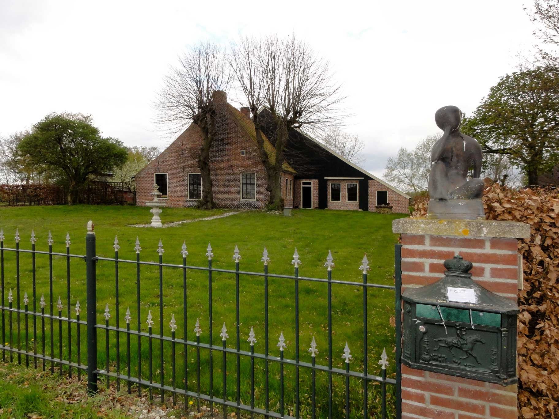 Boerderij Wessinghuizerweg11a in Höfte